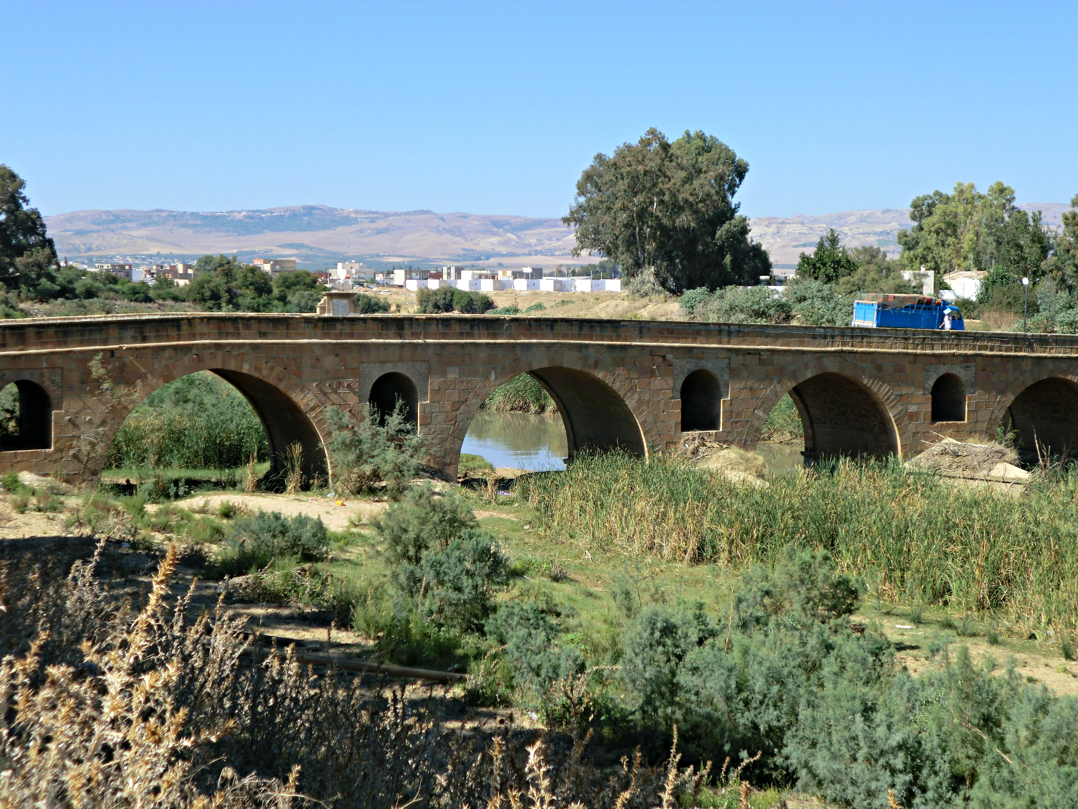 Pont sur la Medjerda, Medjez el-Bab